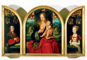 Kerkring-Altar des Jacob van Utrecht heute im St.-Annen-Kloster Lübeck in Lübeck.